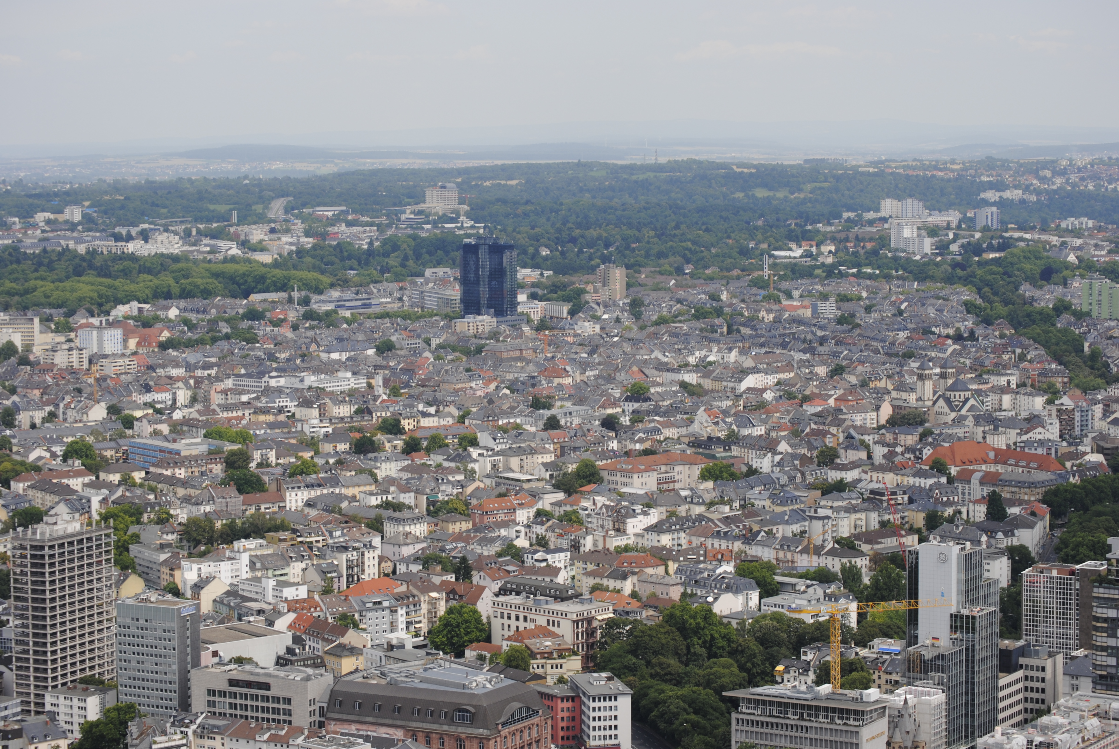 Blick vom Maintower